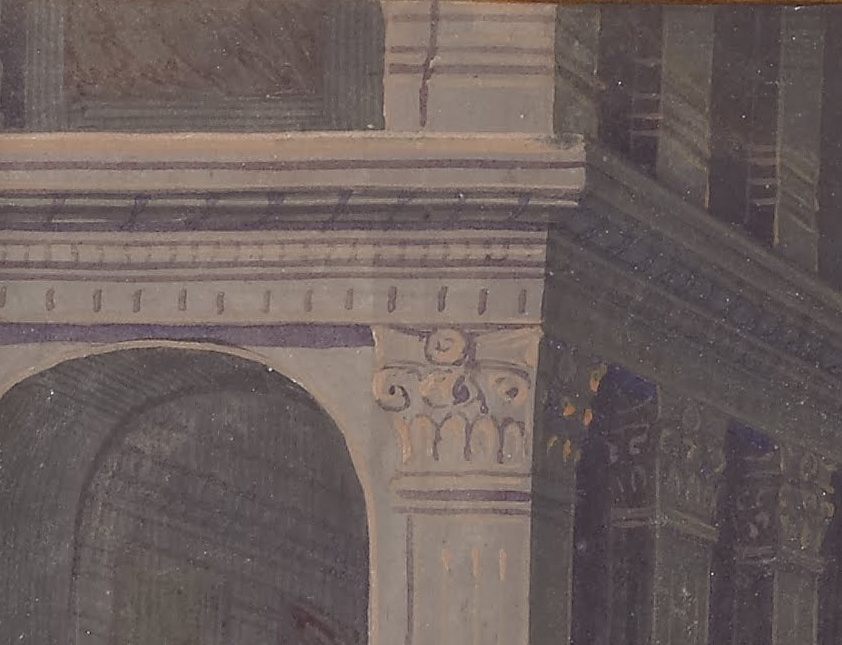 Heures Louis XII Présentation au Temple (détail) - Bâtiment aux pigments de bismuth